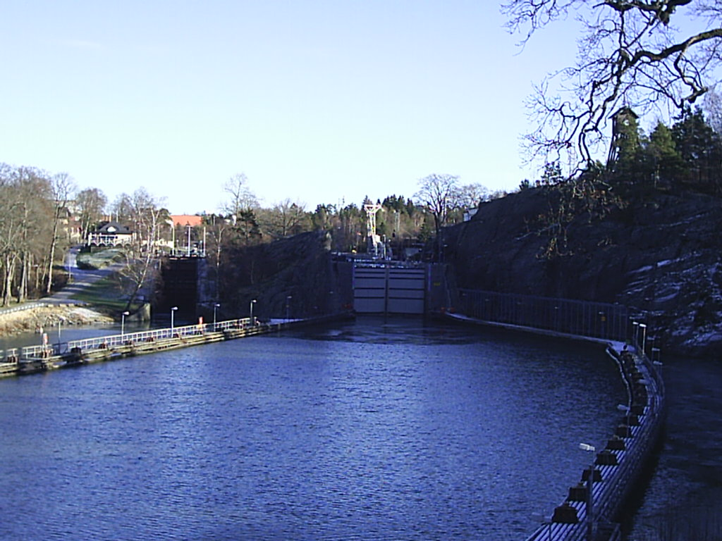 1844 och 1916 års slussleder i Trollhättan. Fotograf: Tubaist Tubaist 1 februari 2005 kl.11.13 (CET)